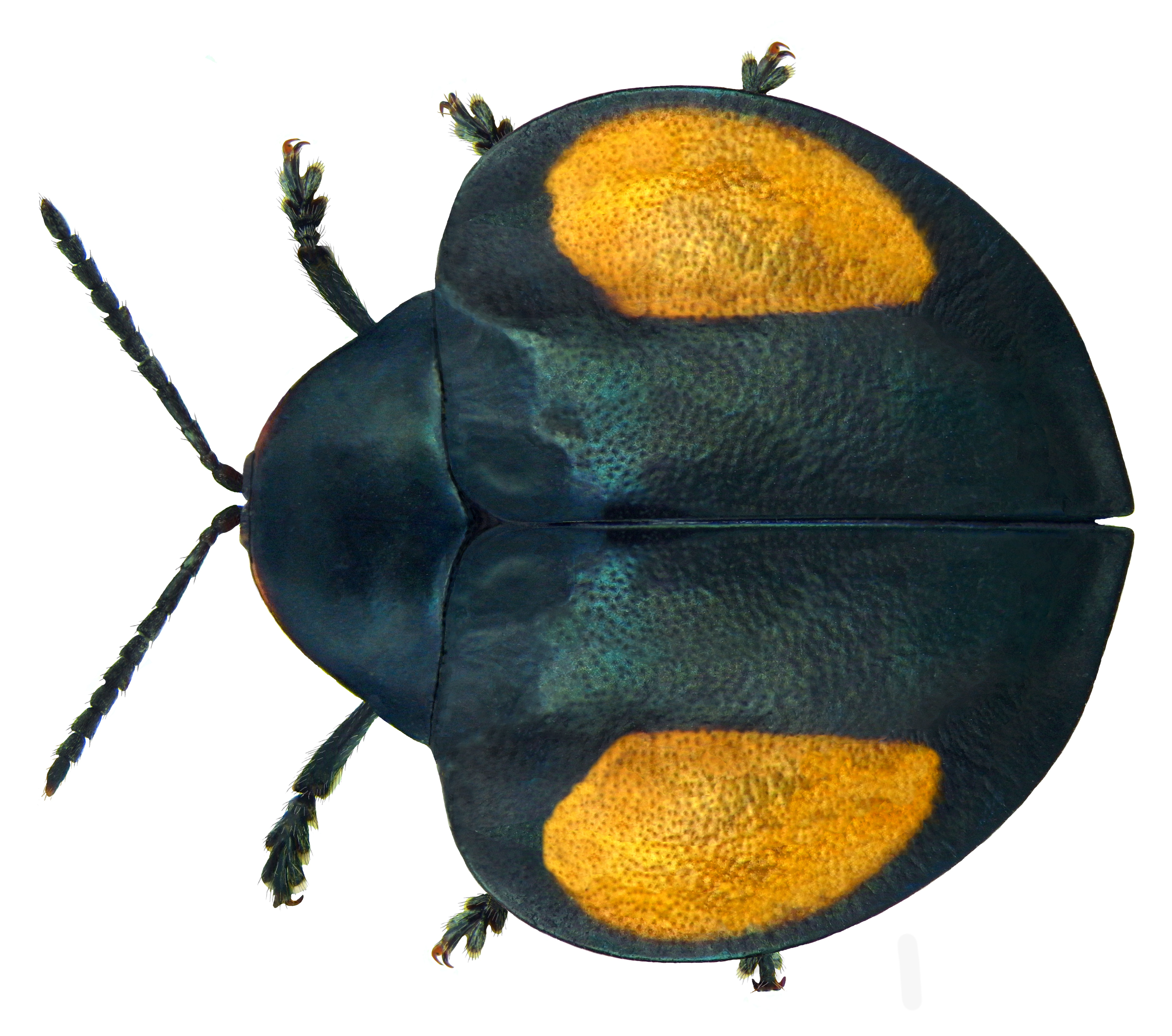 Familie: Chrysomelidae Groesse: 13,0 mm Fundort: Peru, Salvacion, Rio Alto de Madre de Dios, Manu Park, 500 m leg: III.1997; det. L.Borowiec, 2011 Photo: U.Schmidt, 2011